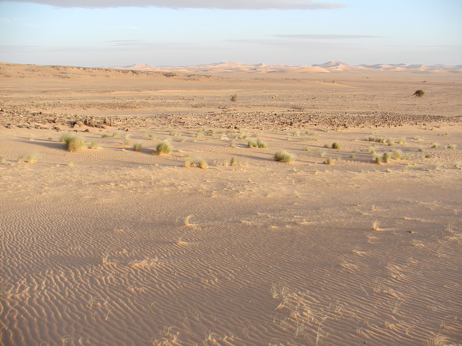 Gara Khanfoussa - Berg an der Gräberpiste - Algerien